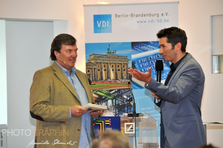 Detlef Untermann interviewt den TV-Moderator Stefan Gödde (r.) bei einer Veranstaltung des VDI Berlin-Brandenburg beim Tag der Technik 2013 in Berlin.